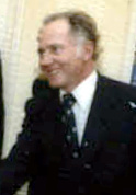 Ben Abruzzo